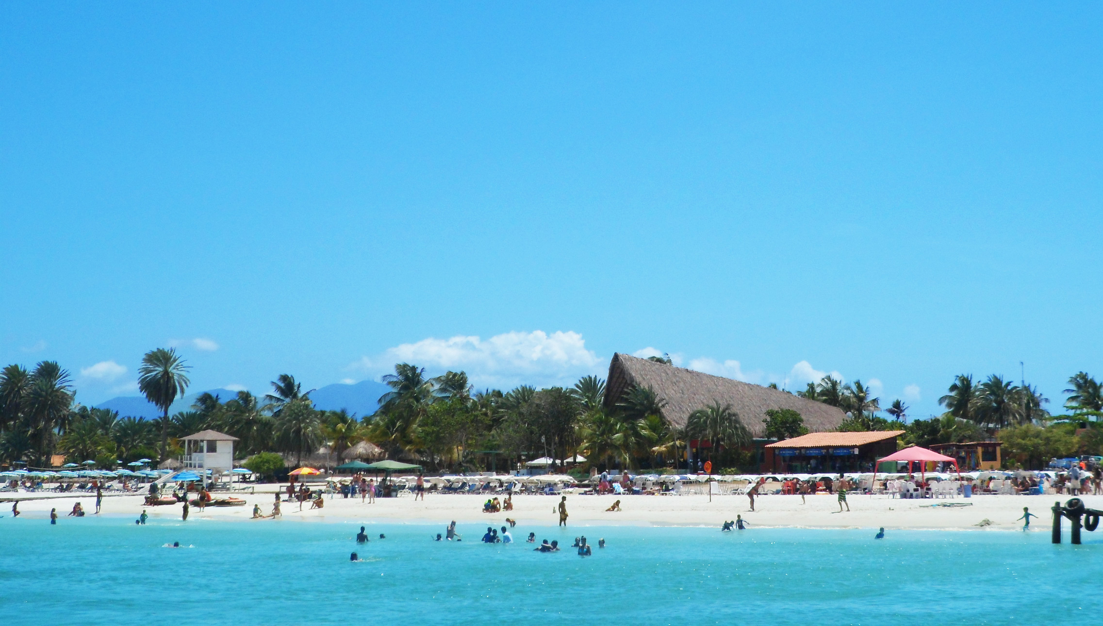 Isla de coche, estado Nueva Esparta, Venezuela.